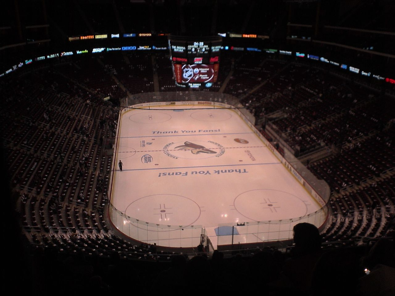 Glendale Arena auteur : Fantt